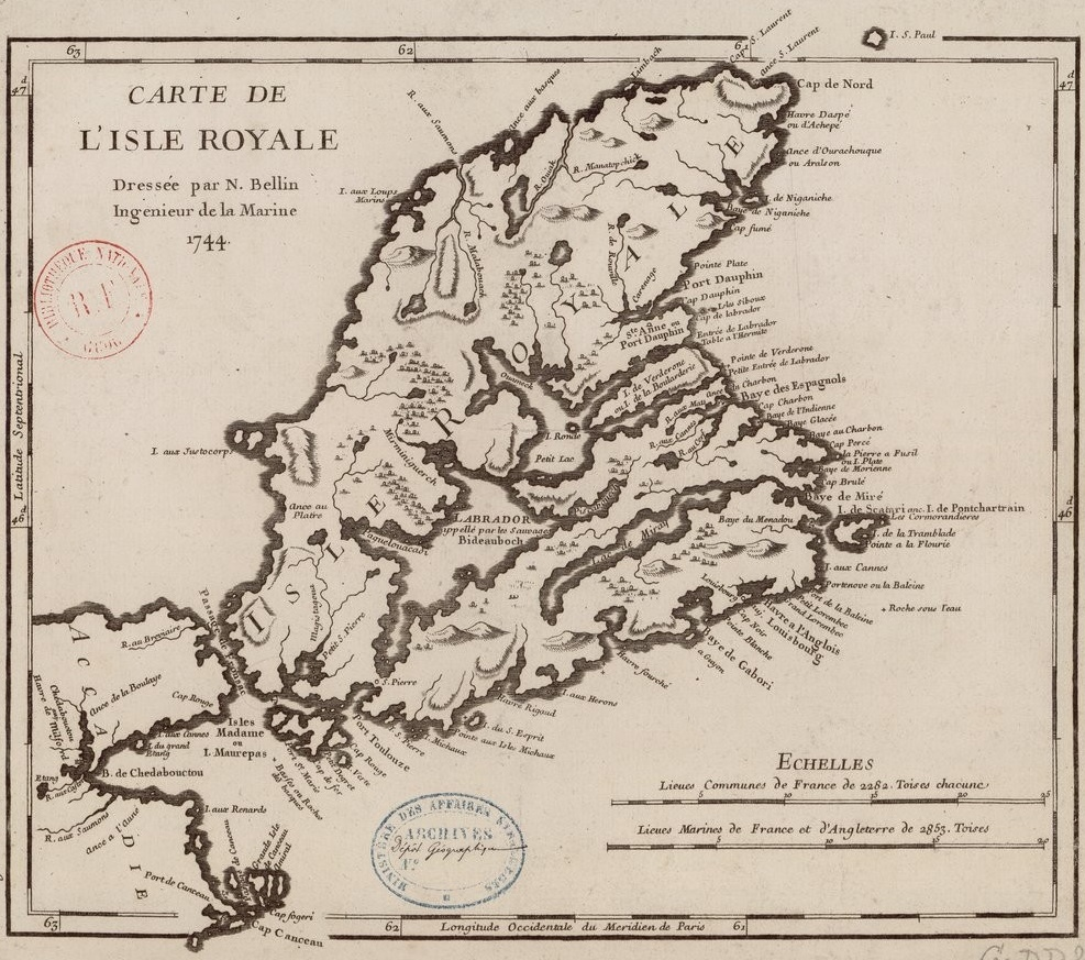 Carte de l'Ile Royale en 1744 par Jacques-Nicolas Bellin. 27 x 31 cm. Département Cartes et plans. Collection d'Anville.